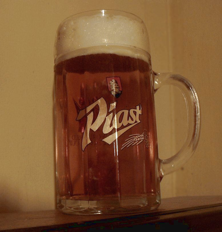 Litrowy kufel Piasta stworzony w roku 2000 z okazji zdobycia I miejsca na konkursie "World Beer Cup"